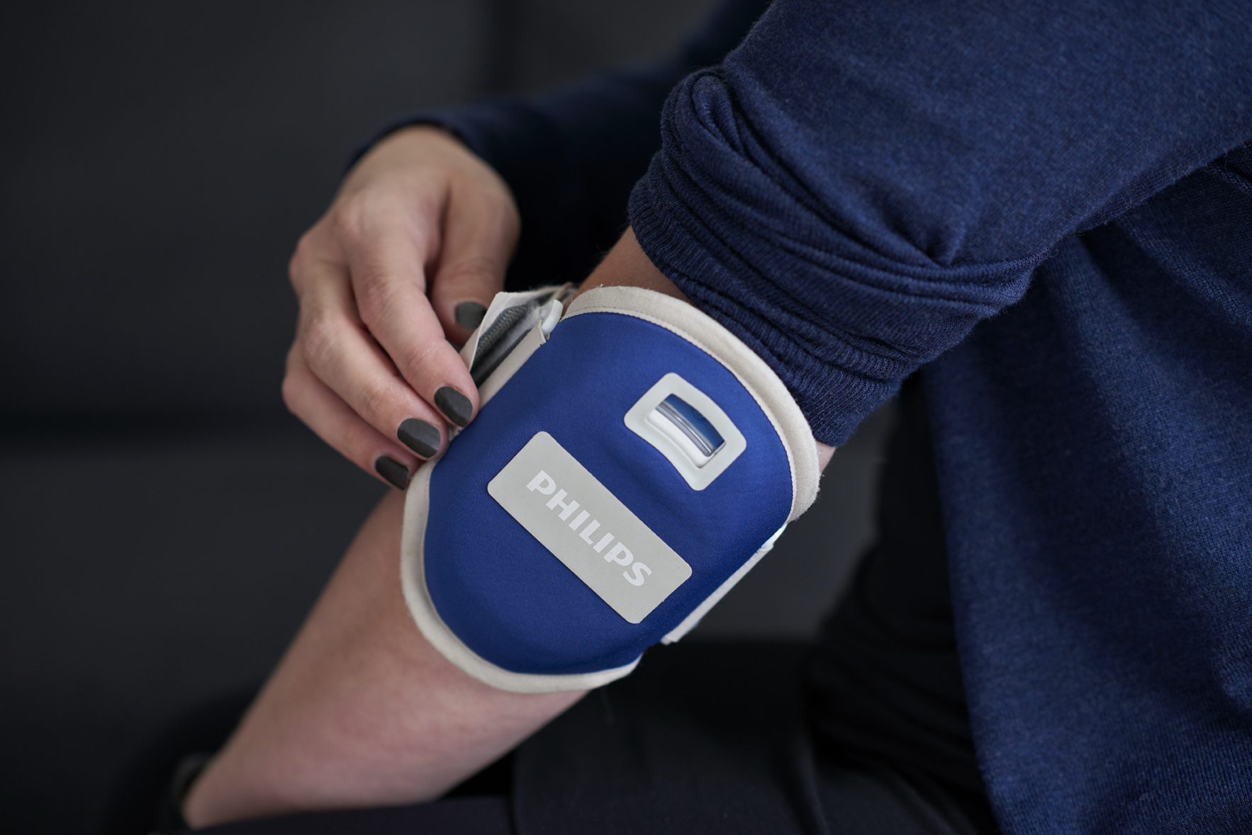 Dermatologisk lysbehandling